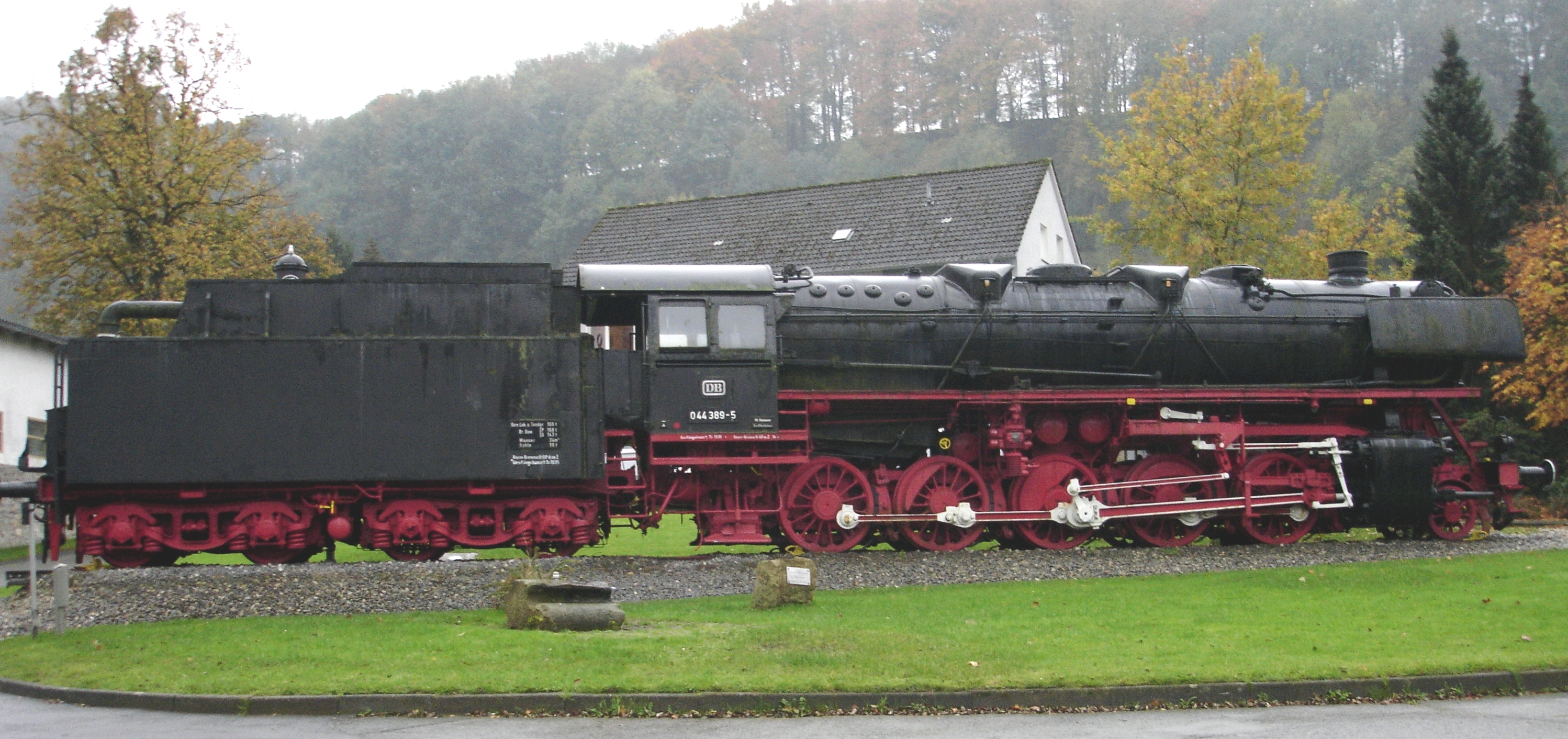 Denkmallok der Baureihe 44, Nummer 044 389-5, in Altenbeken an einem verregneten Tag im Oktober 2006.